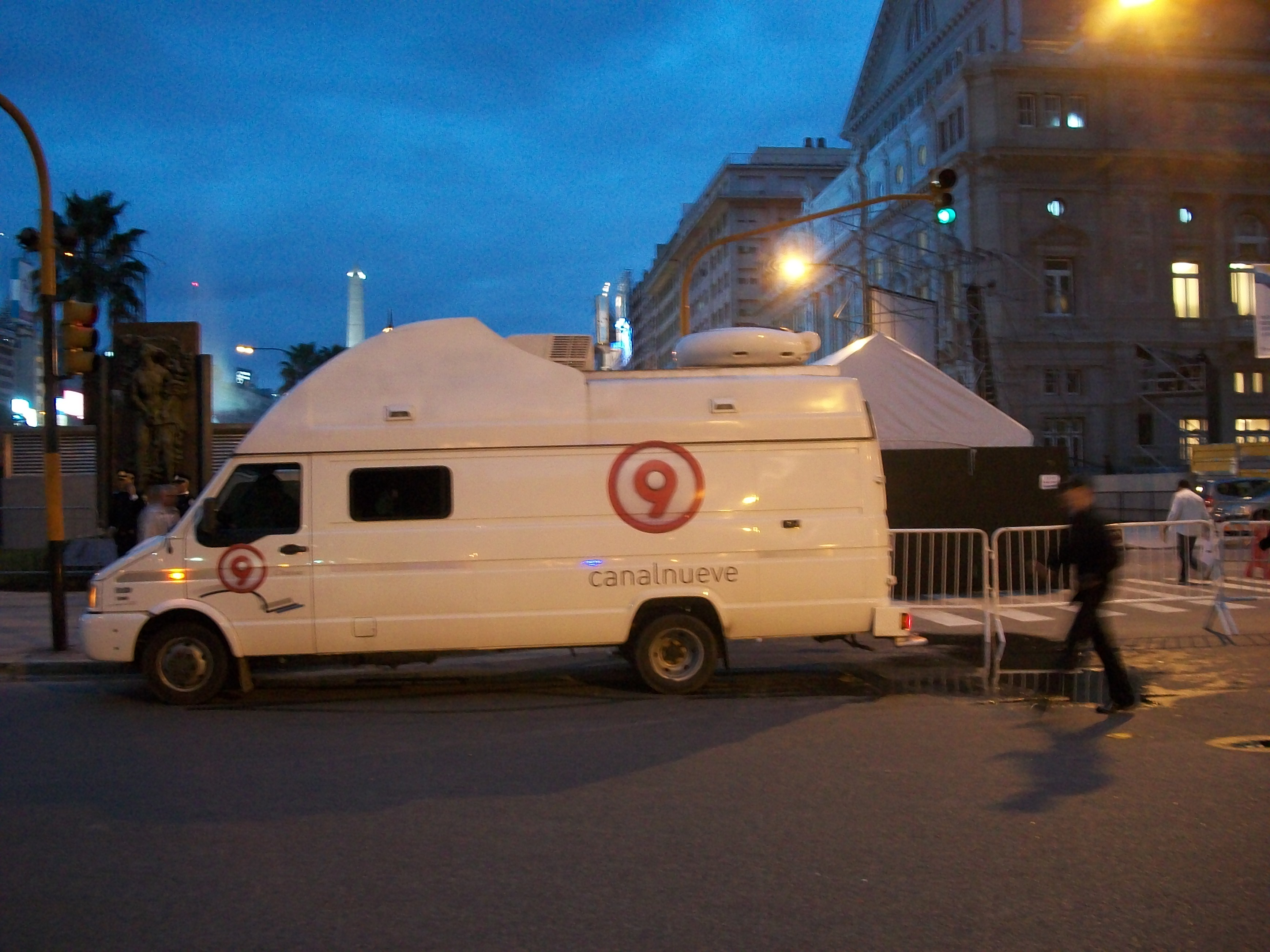 Bicentenario de Argentina